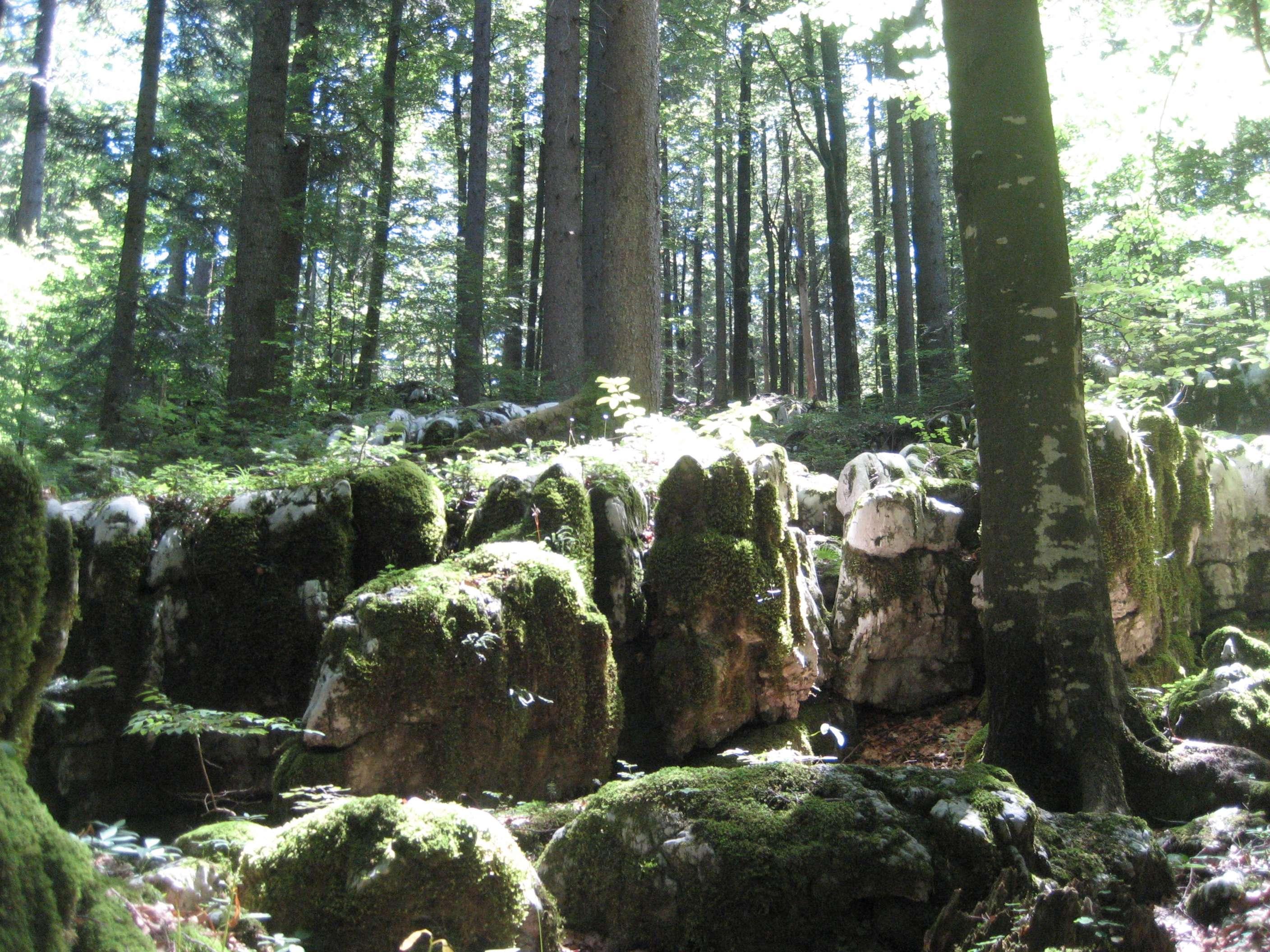 Suma u Kršu